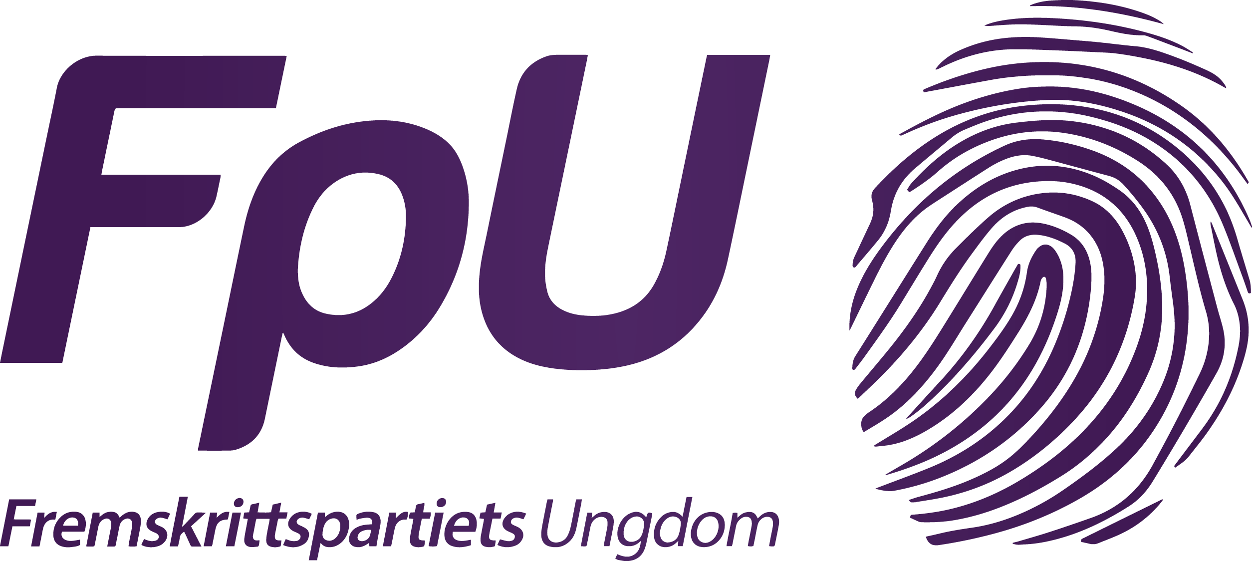 Fremskrittspartiets Ungdoms logo fra 2013.